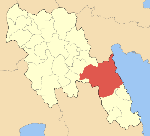 Locator map of Voreias Kynourias municipality (Δήμος Βόρειας Κυνουρίας) at Arcadia perfecture, Peloponnissos, Greece.